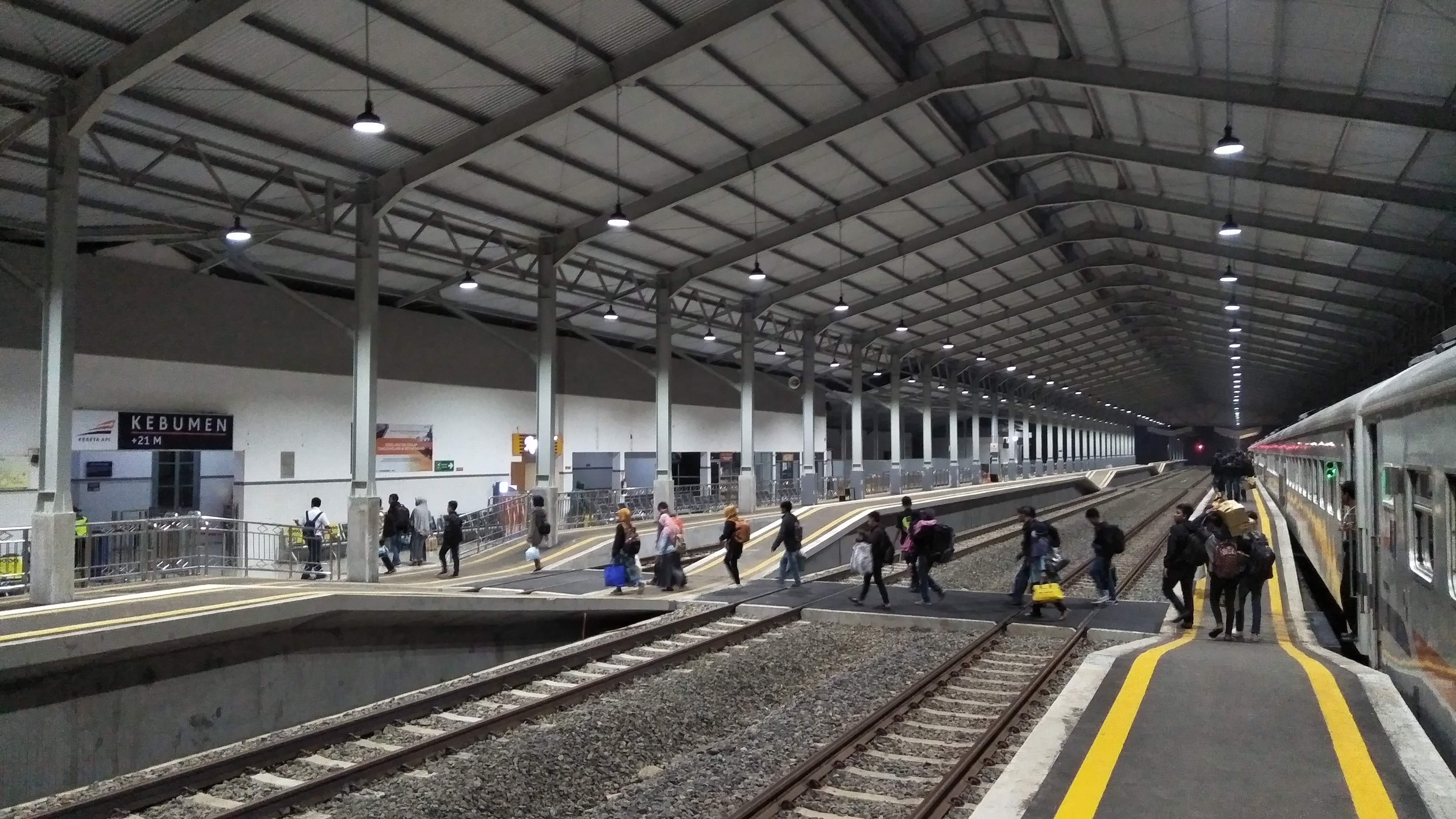 Emplasemen stasiun Kebumen